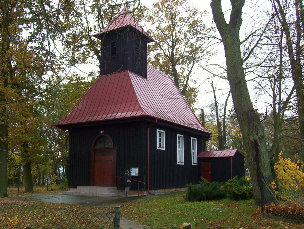 Kozielec, kościół fil. p.w. Niepokalanego Poczęcia NMP, drewn., 1906 (zabytek nr rejestr. A/787)